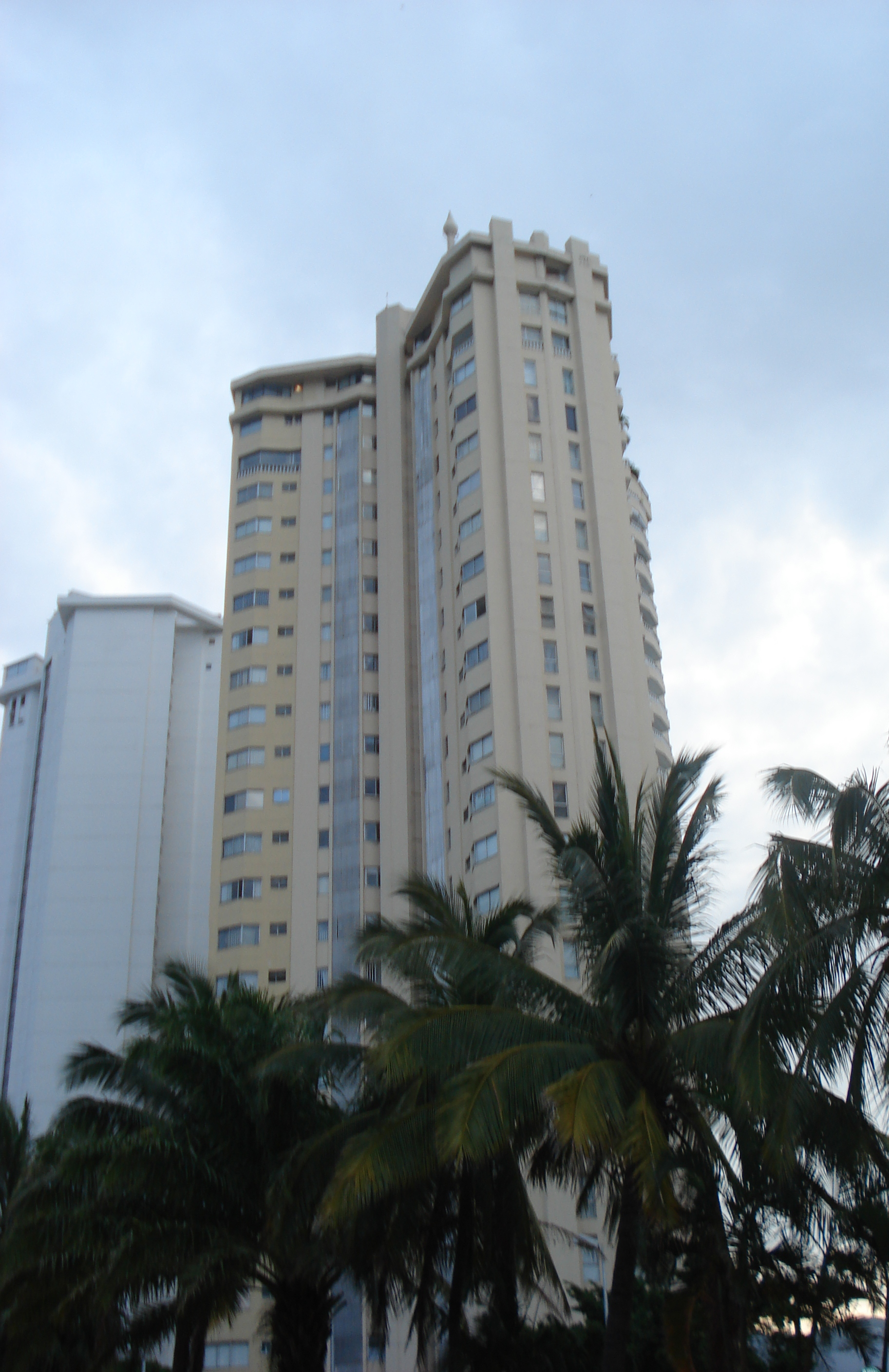 Torre Estrella de Mar, el tercer rascacielos más alto en Acapulco, Guerrero, México.